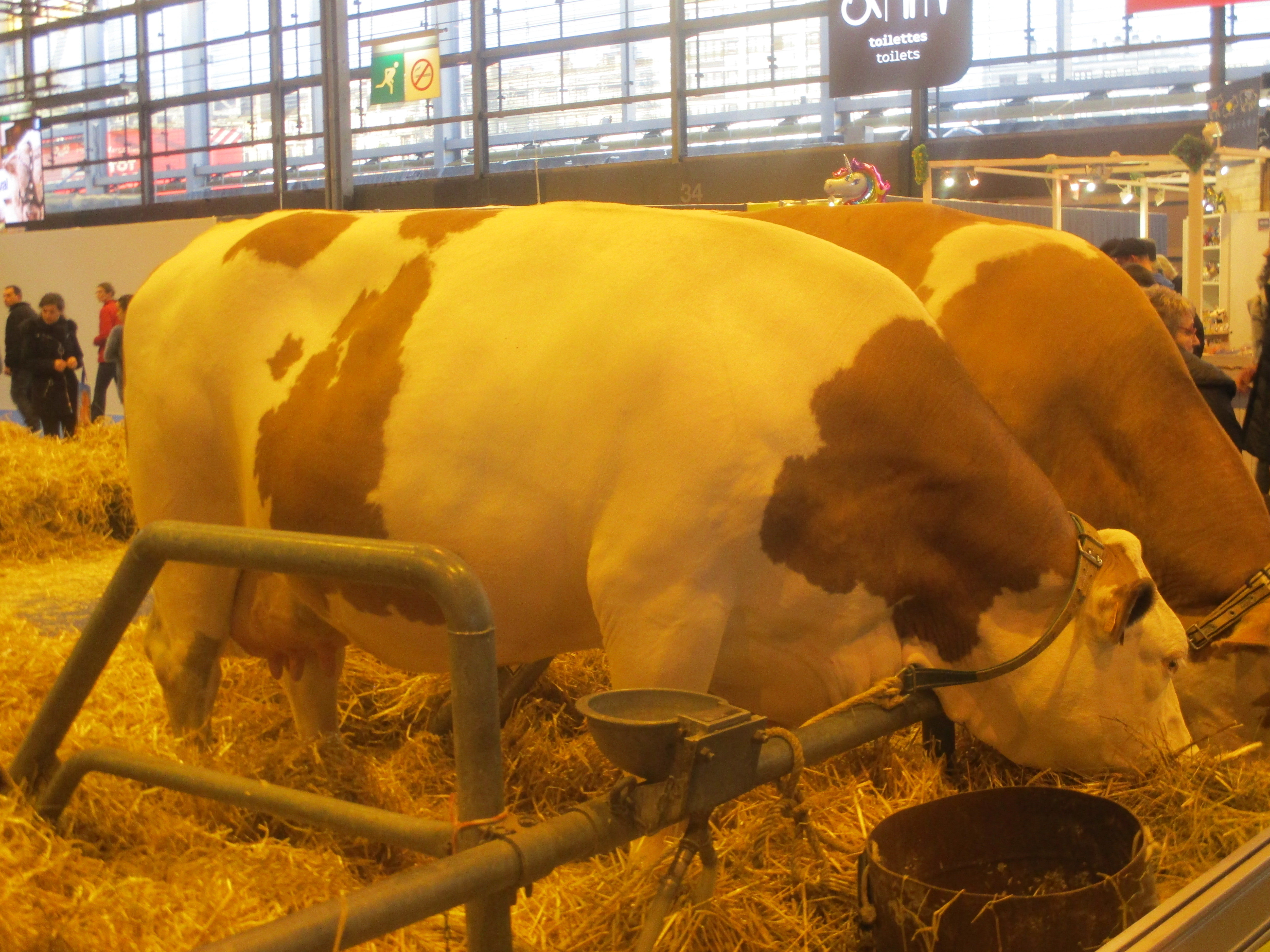 Vache simmental française au SDA 2018.